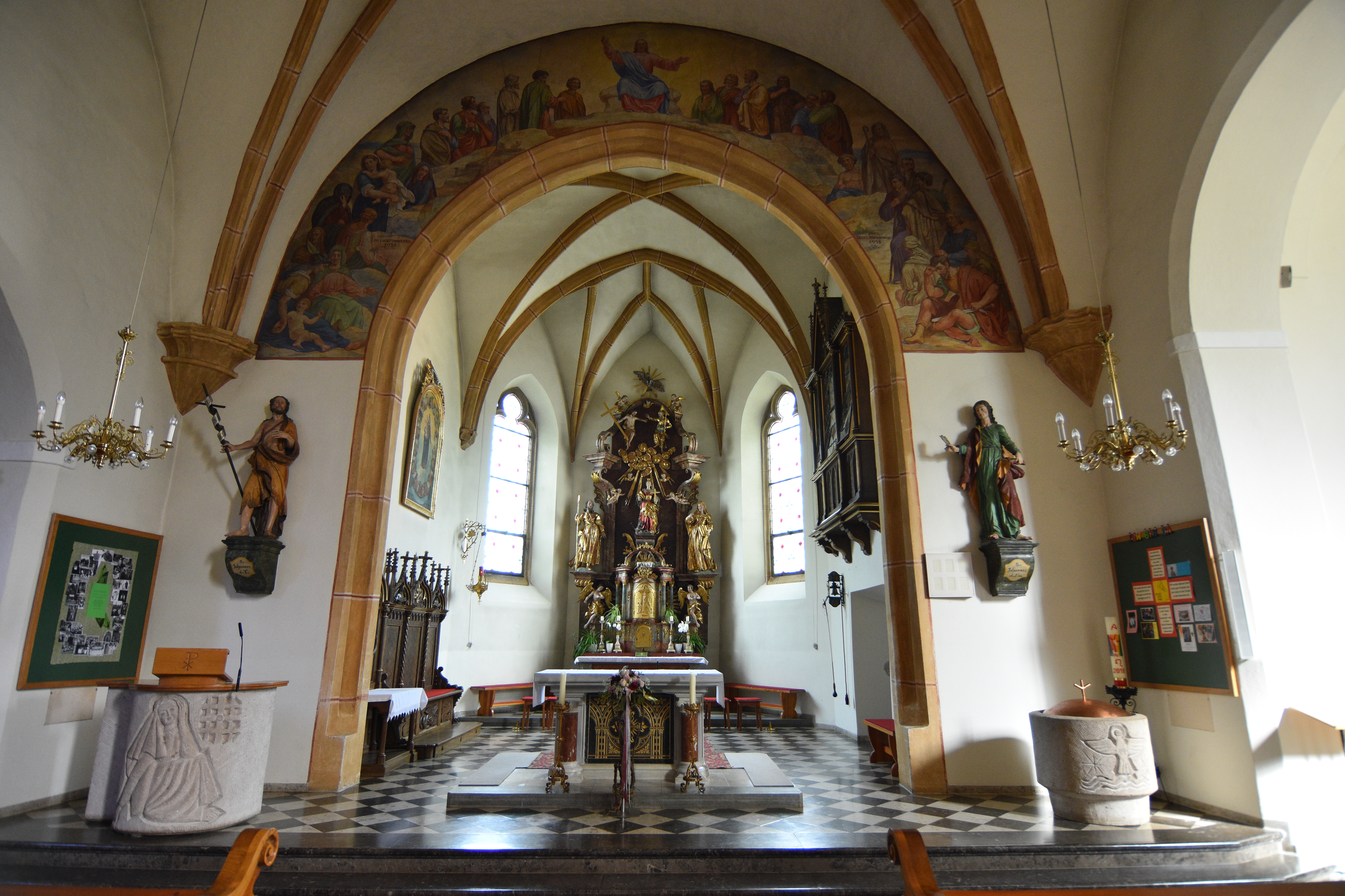 Parish Church Sankt Margarethen an der Raab Interior